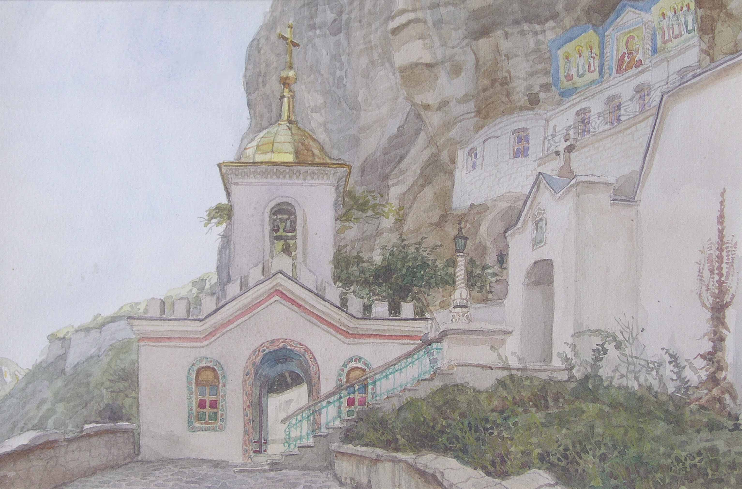 Пещерный монастырь в районе Бахчисарая